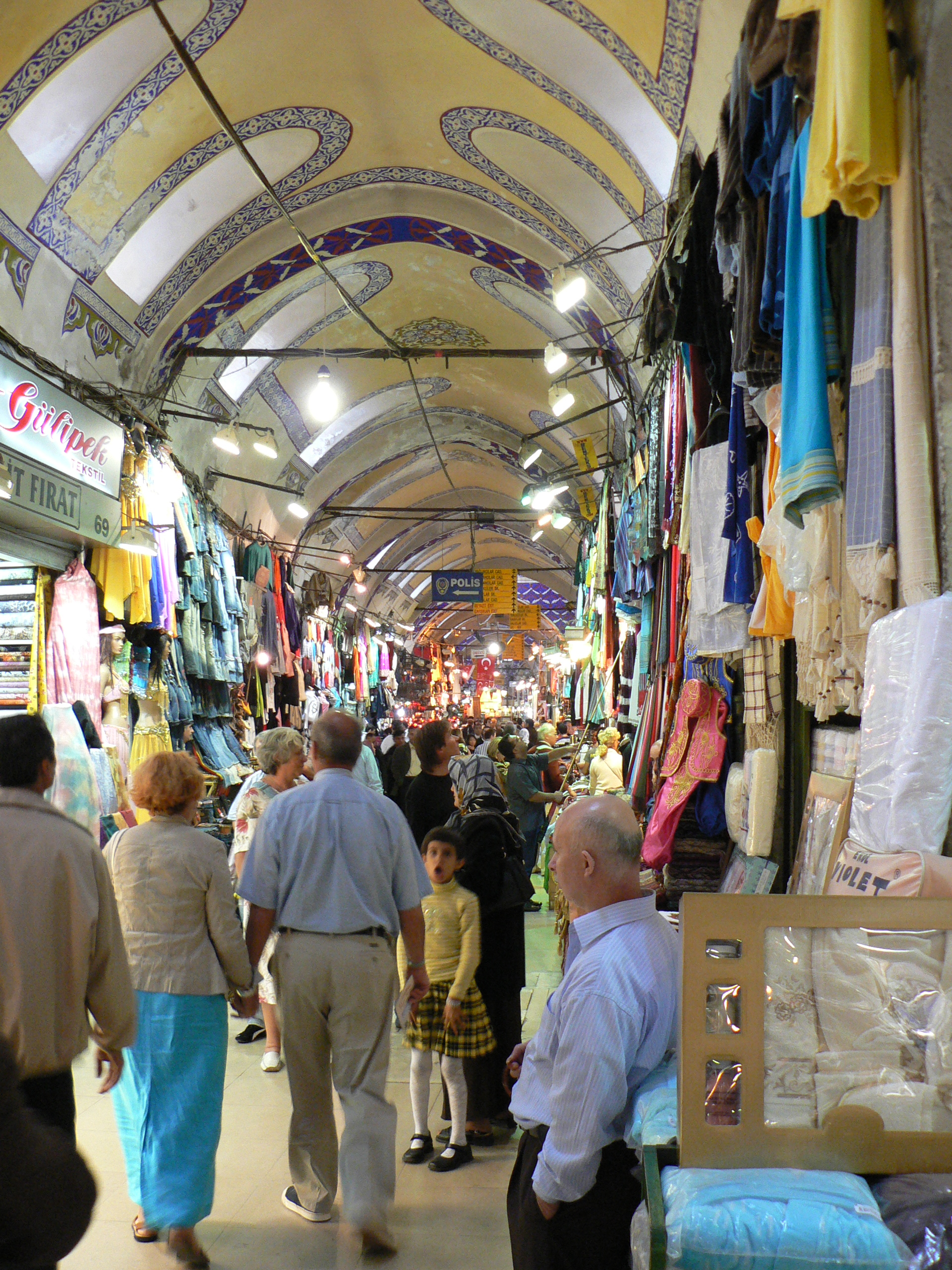 Egyptian bazaar, Istanbul